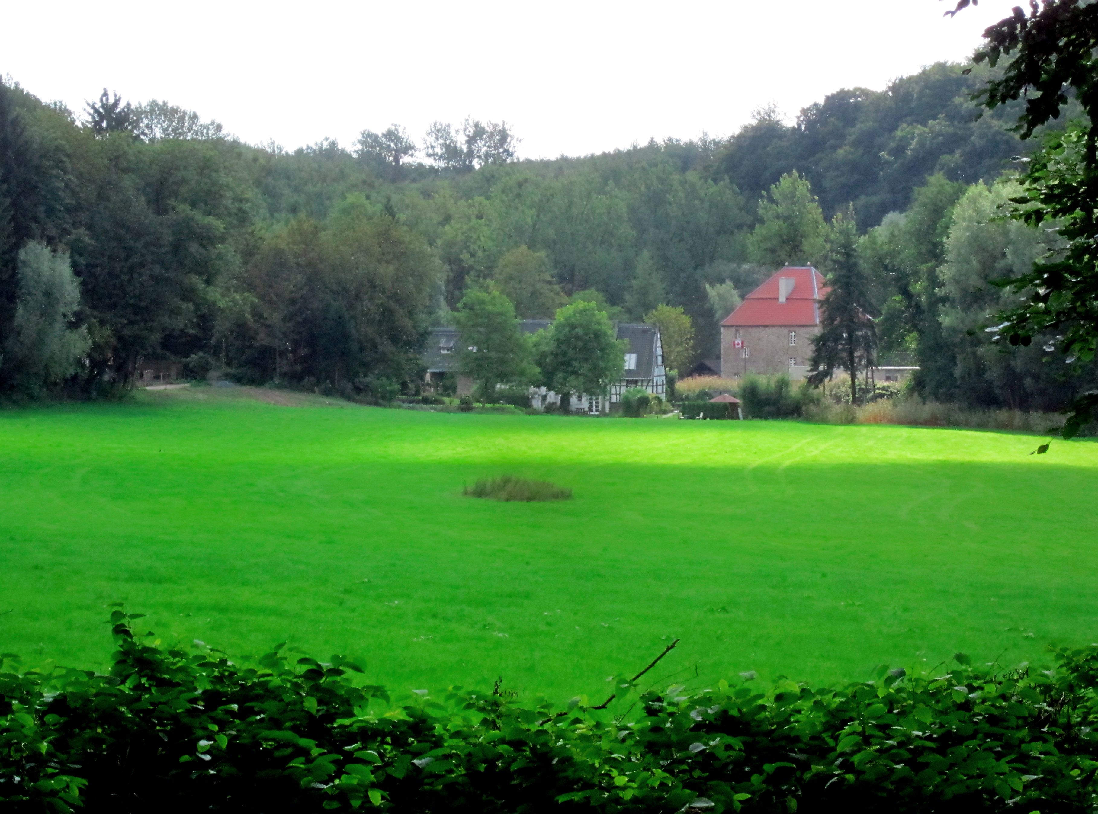 Haus Anger und die Angermühle mit breit vorgelagerter Talaue von Westen